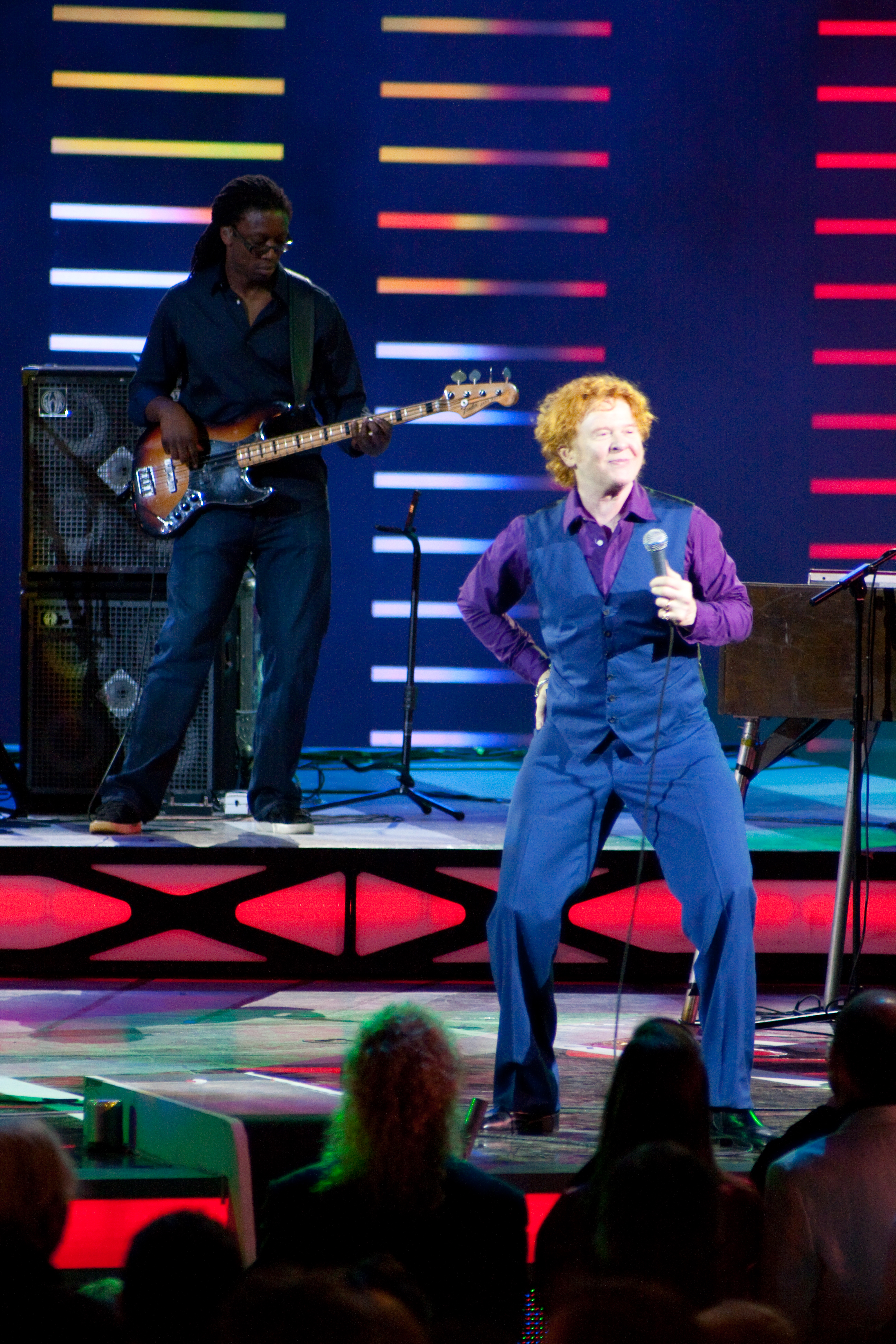 Simply Red en Viña del Mar, Chile.